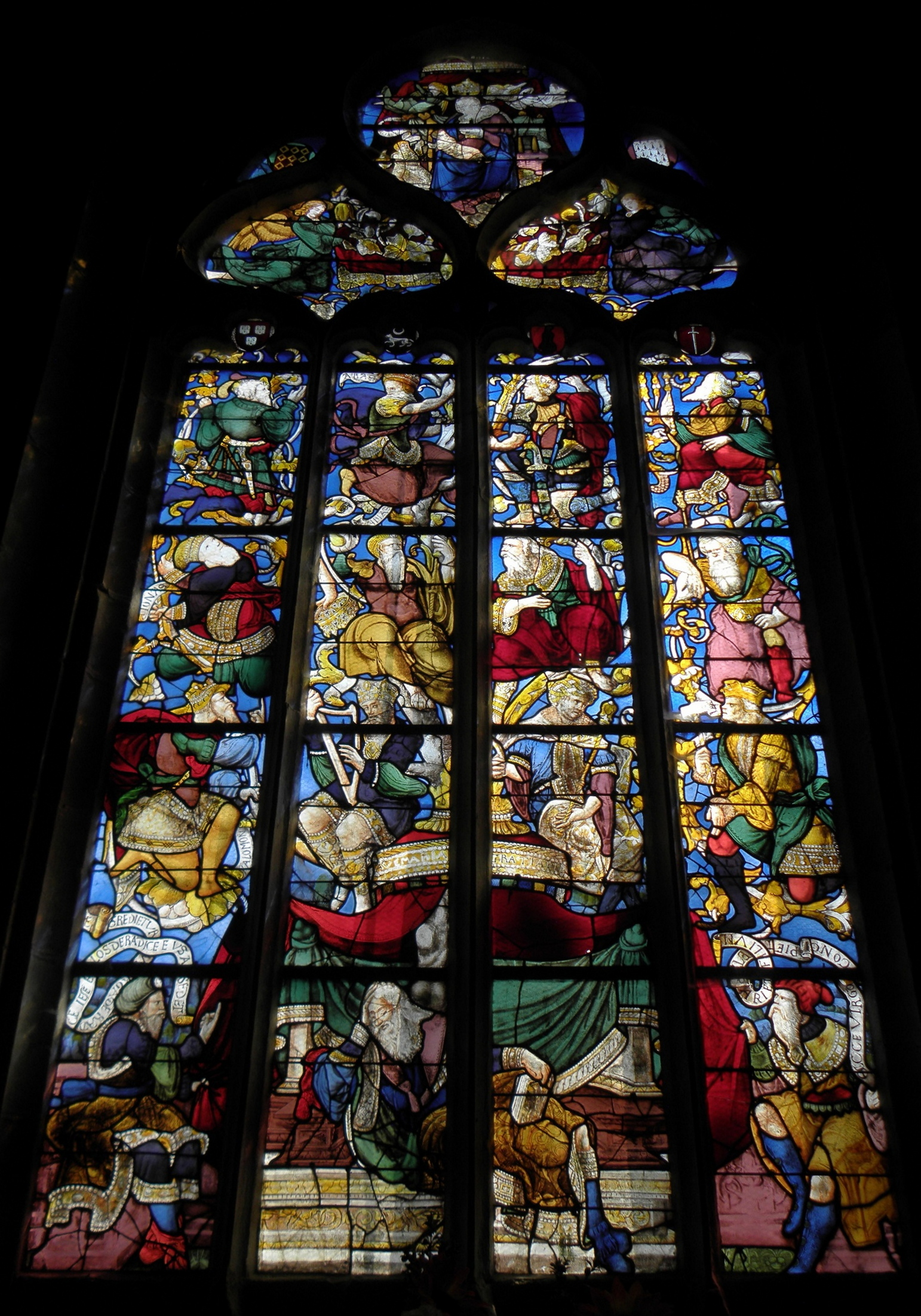 Maîtresse-vitre de l'église Saint-Mériadec de Stival en Pontivy (56).